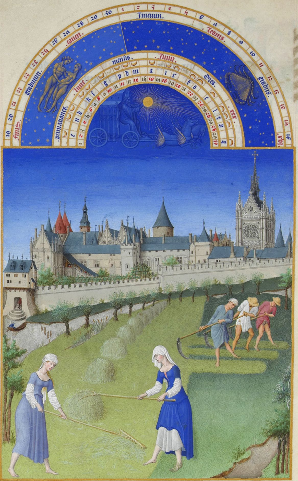 C'est une illustration des travaux paysans avec une scène de fenaison. Tandis qu'au premier plan une femme râtelle du foin et qu'une autre le met en meule à l'aide d'une fourche, trois faucheurs forment des andains au second plan à droite. D'autres personnages minuscules sont représentés dans une barque sur le fleuve, dans l'escalier menant à la poterne et dans l'escalier couvert à l'intérieur du palais. La scène se déroule en bordure de Seine, dans un champ situé à l'emplacement de l'hôtel de Nesle, résidence parisienne du duc de Berry. De l'autre côté du fleuve s'étend dans toute sa longueur le palais de la Cité, avec successivement les jardins du roi, la Salle sur l'eau, les trois tours Bonbec, d'Argent et César, puis la tour de l'Horloge. Derrière la galerie Saint-Louis au centre, les deux pignons de la Grande Salle, le Logis du roi et la tour Montgomery. À droite, la Sainte-Chapelle.